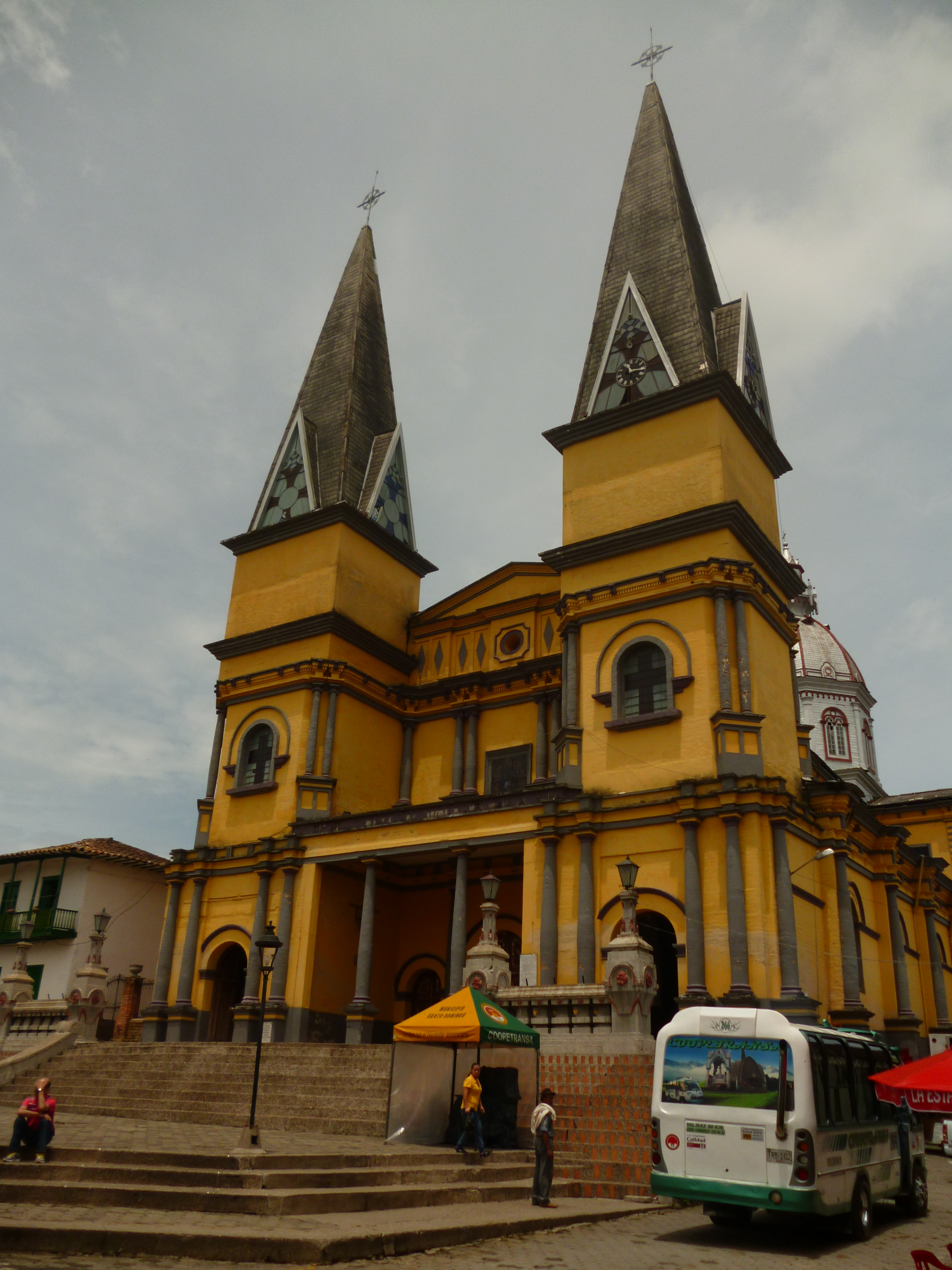 Iglesia del parque principal de Santo Domingo, Antioquia